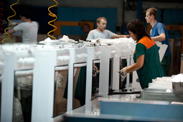 Линия сборки завода ПАО Грета (2013 г.)